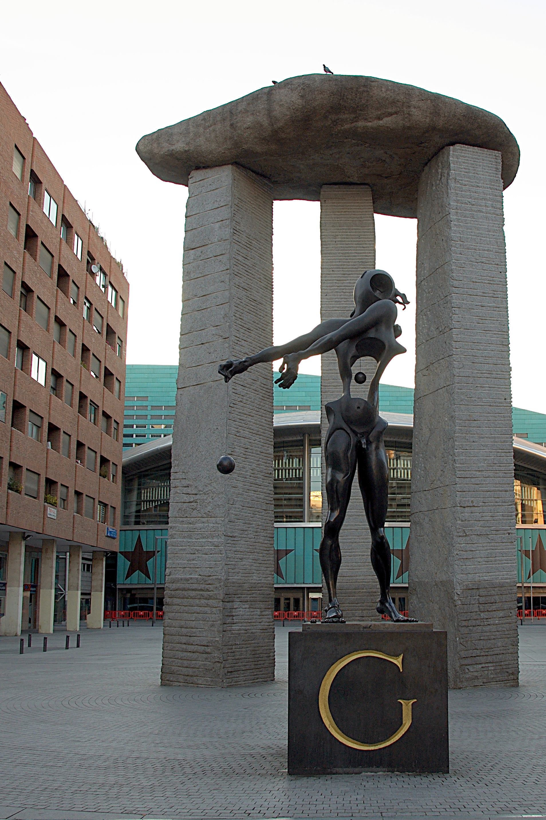 Dolmen de Dalí con el Palacio de los Deportes al fondo